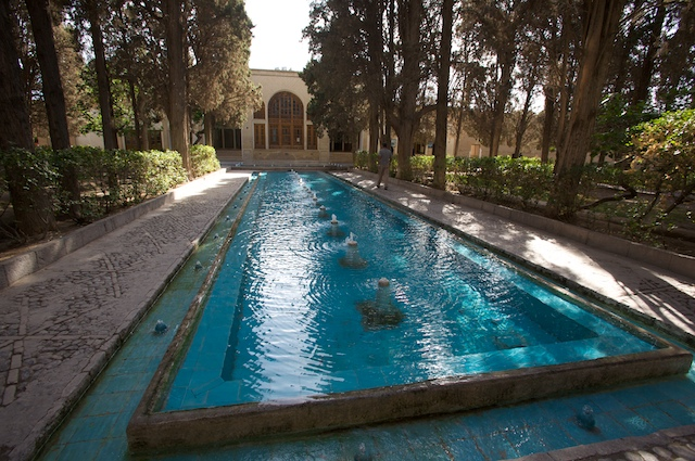 Fin Garden, Bagh-e Tarikhi-ye Fin. Kashan, Iran.